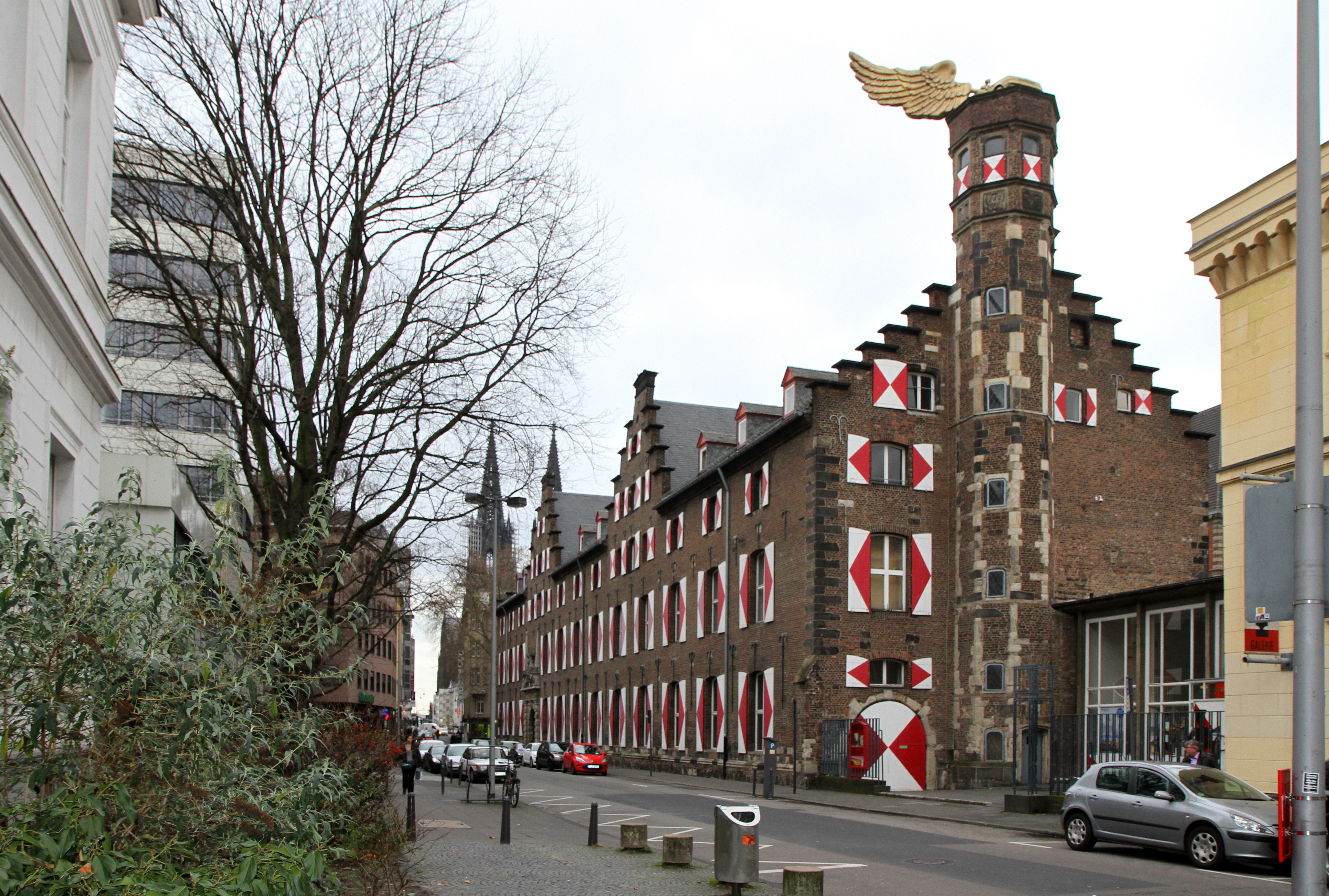 Zeughaus Köln, Ansicht aus der Zeughausstraßer. Baujahr: 1591-1606. Das Gebäude dient als das Kölnische Stadtmuseum.